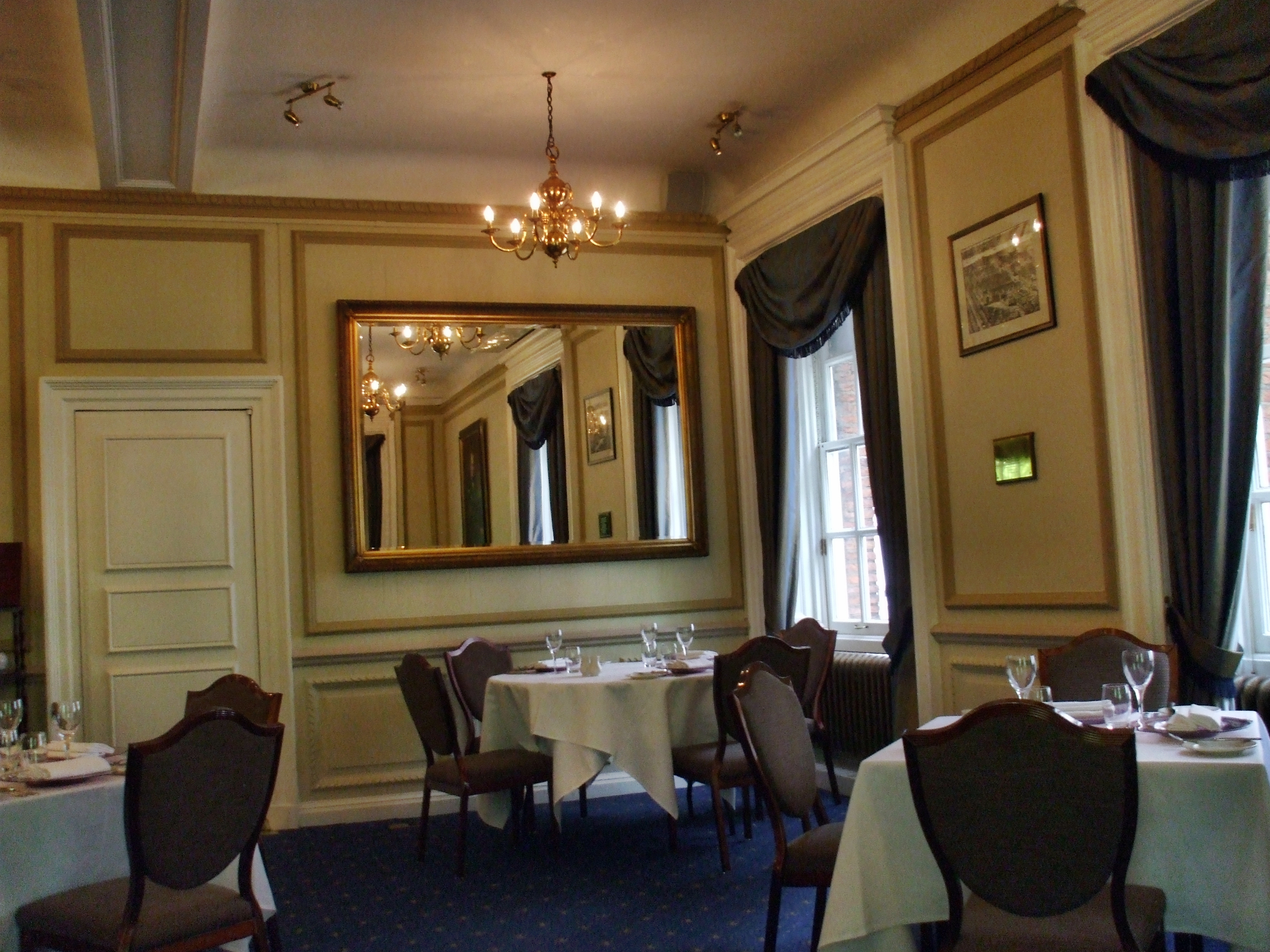 Innenansicht St. Stephen's Club